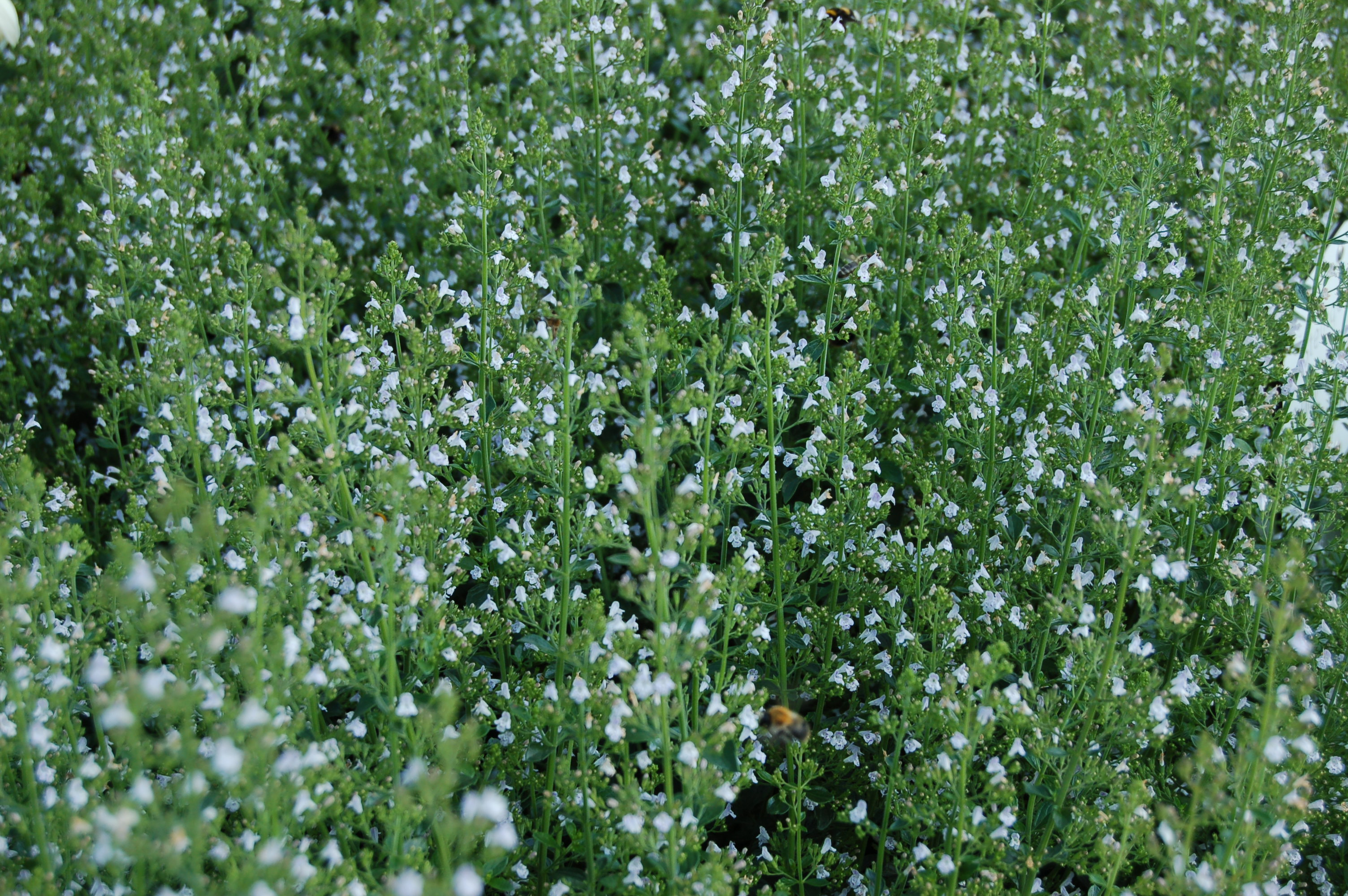 Steinquendel "Nepeta" (Calamintha nepeta ssp.) im Rosarium Uetersen